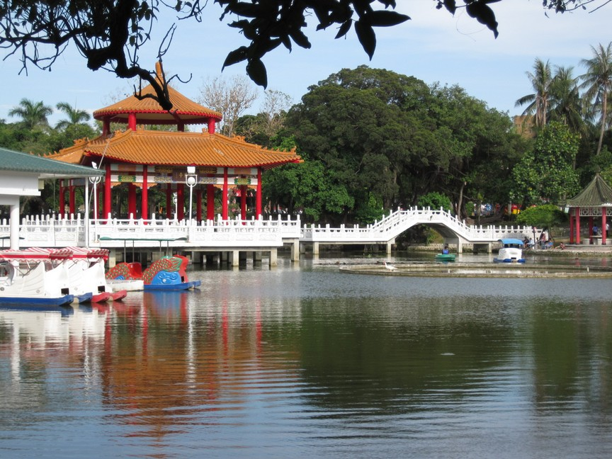 臺南公園燕潭